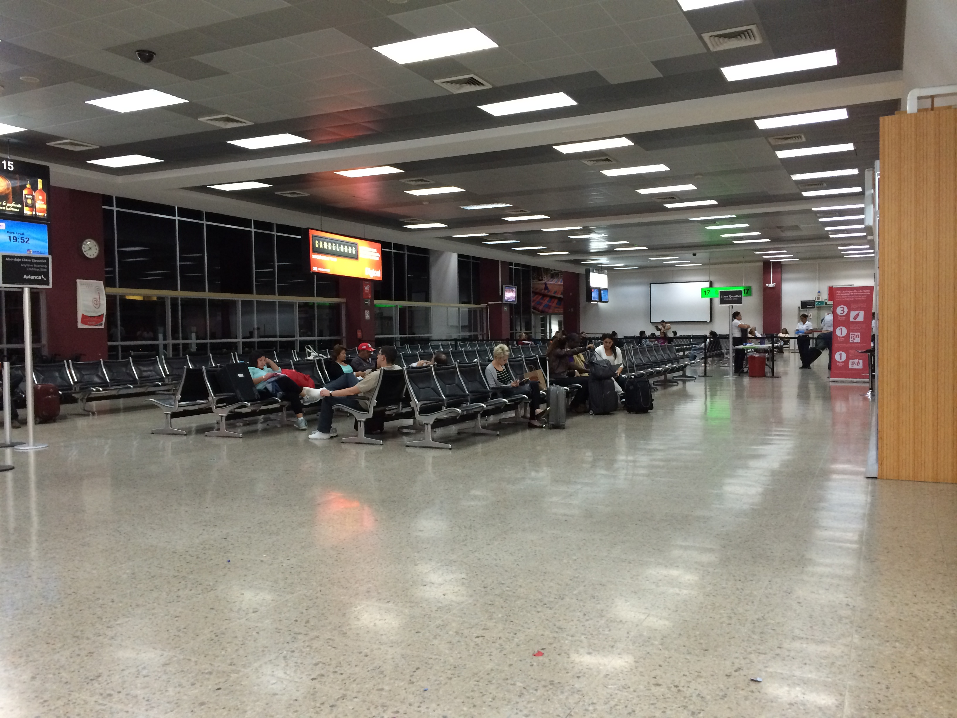 Pasillo del Aeropuerto Internacional de El Salvador